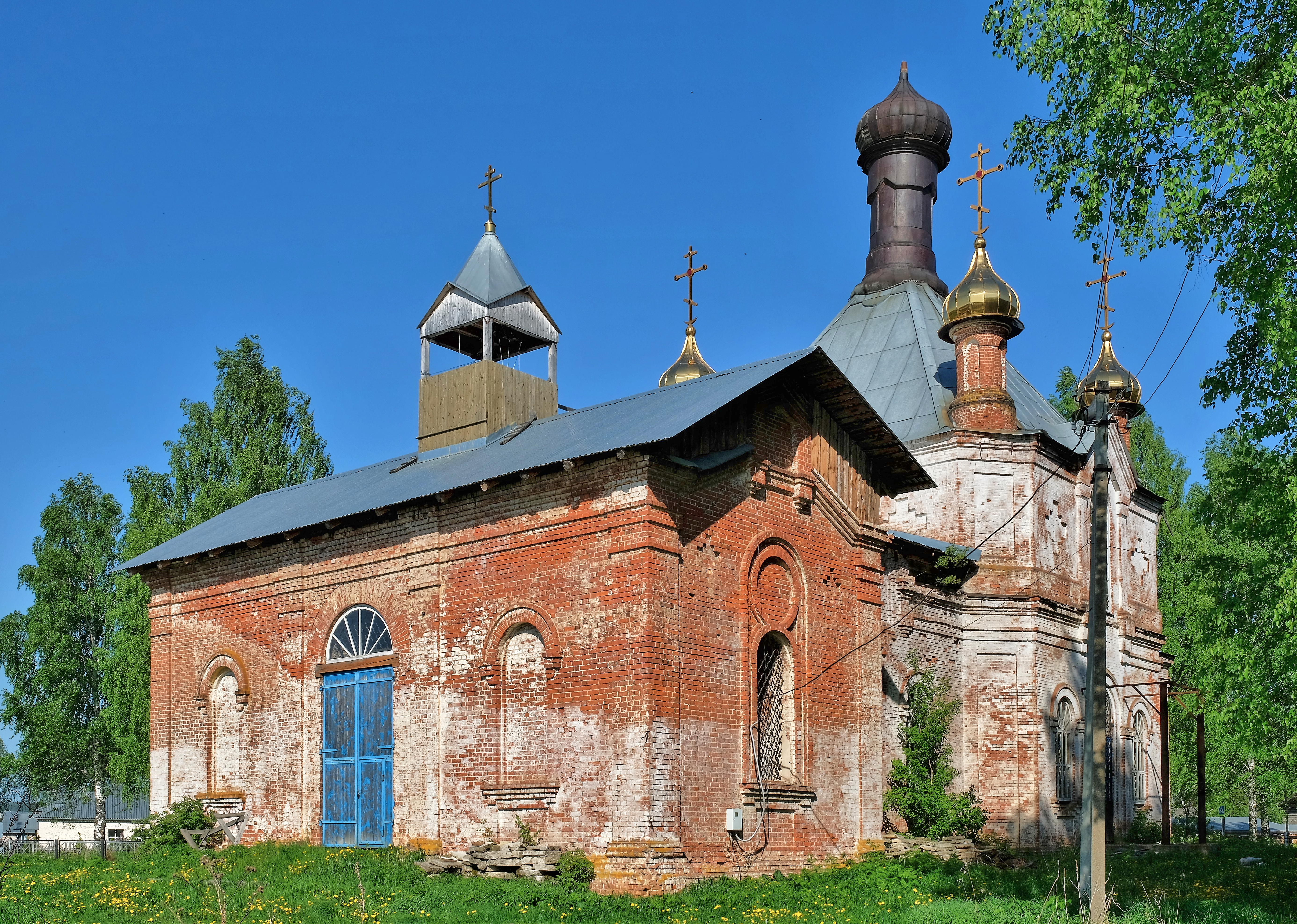 Храм святого равноапостольного великого князя Владимира в селе Полозово, Большесосновский район Пермского края